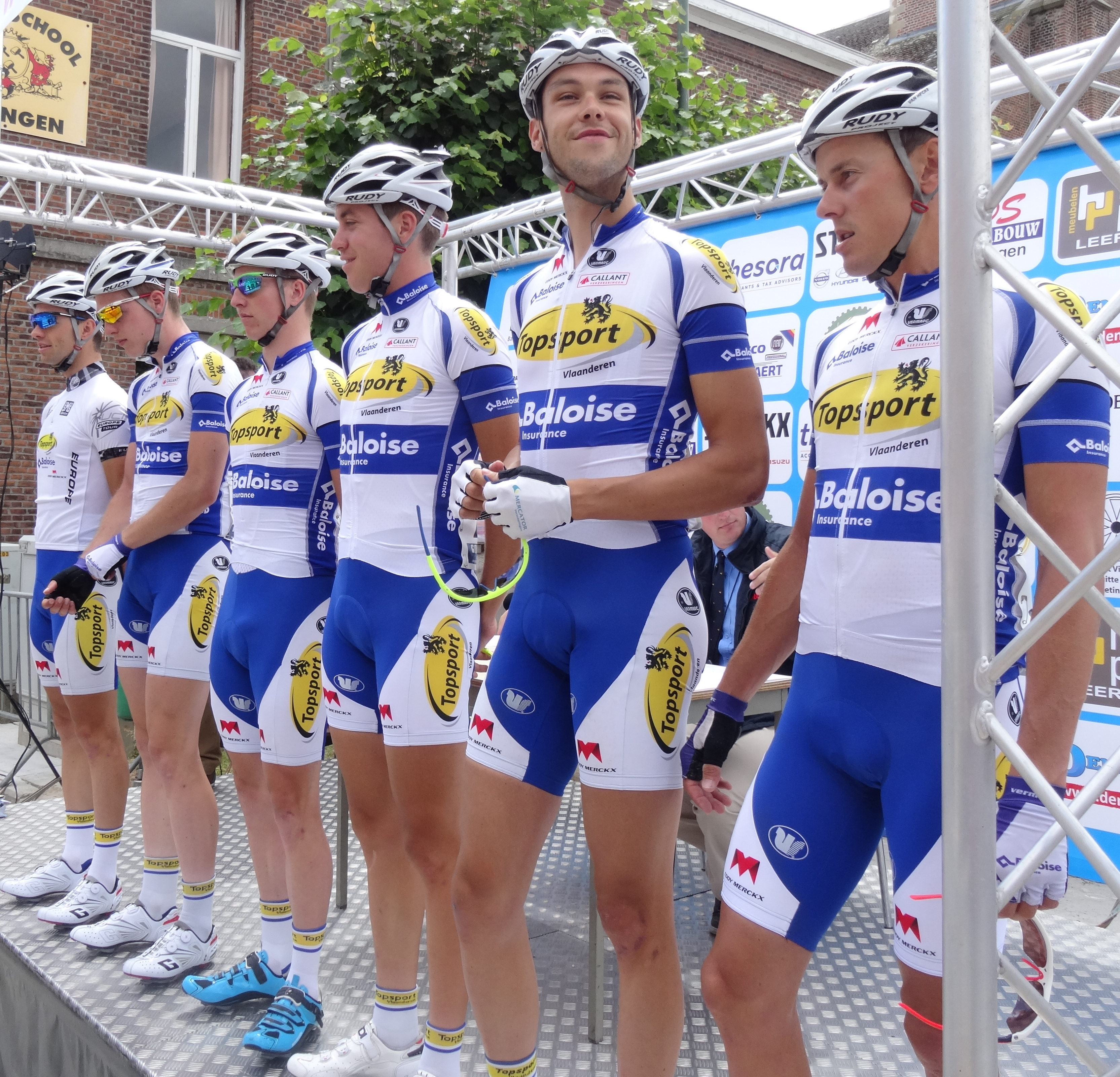 Reportage photographique réalisé le mercredi 25 juin à l'occasion du départ et de l'arrivée de l'Internationale Wielertrofee Jong Maar Moedig 2014 à Oetingen (Gooik), Belgique.